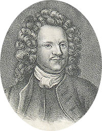 Hans Clerck (1639-1711)